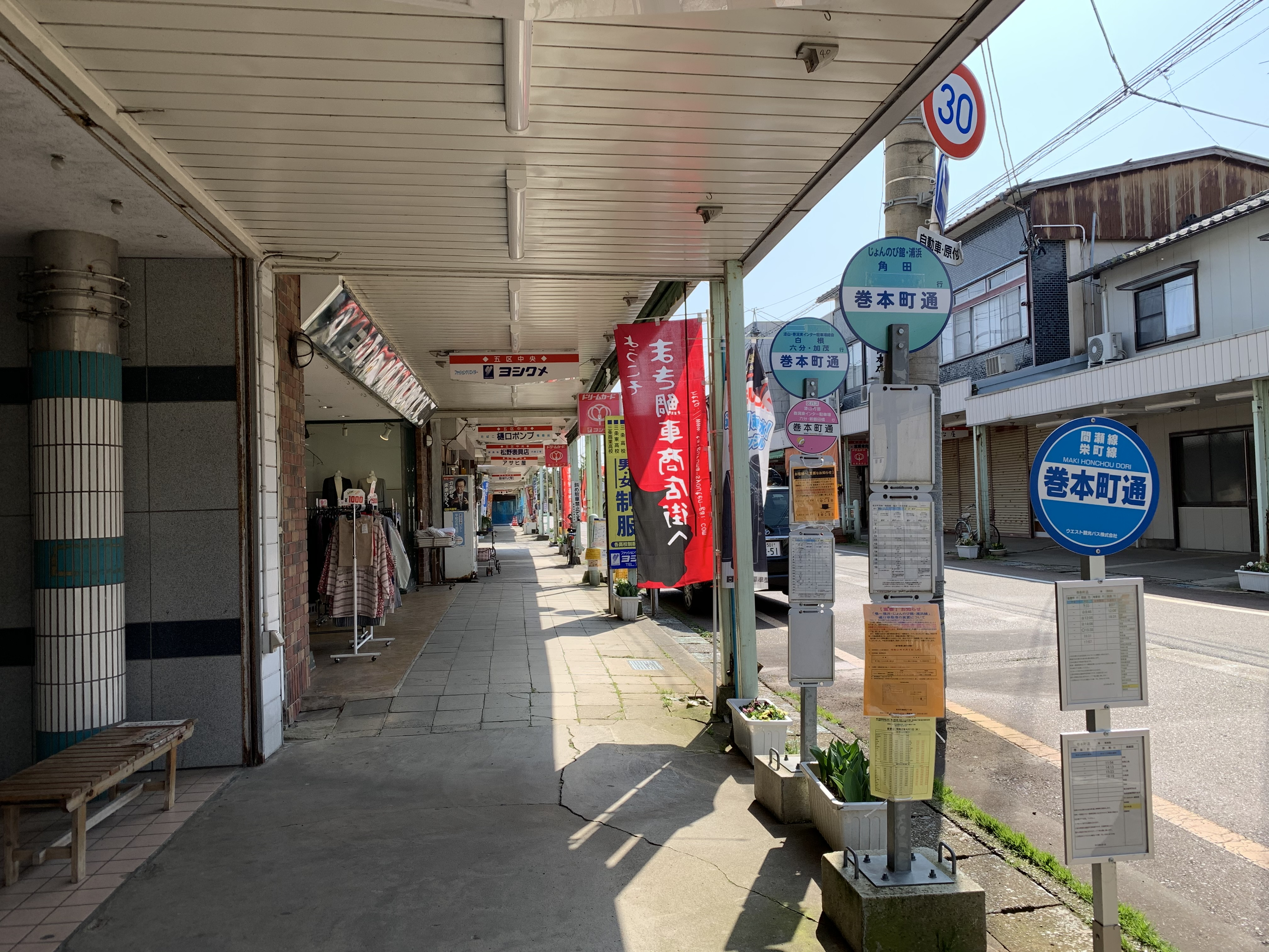 巻本町通バス停（新潟市西蒲区，2020年3月）